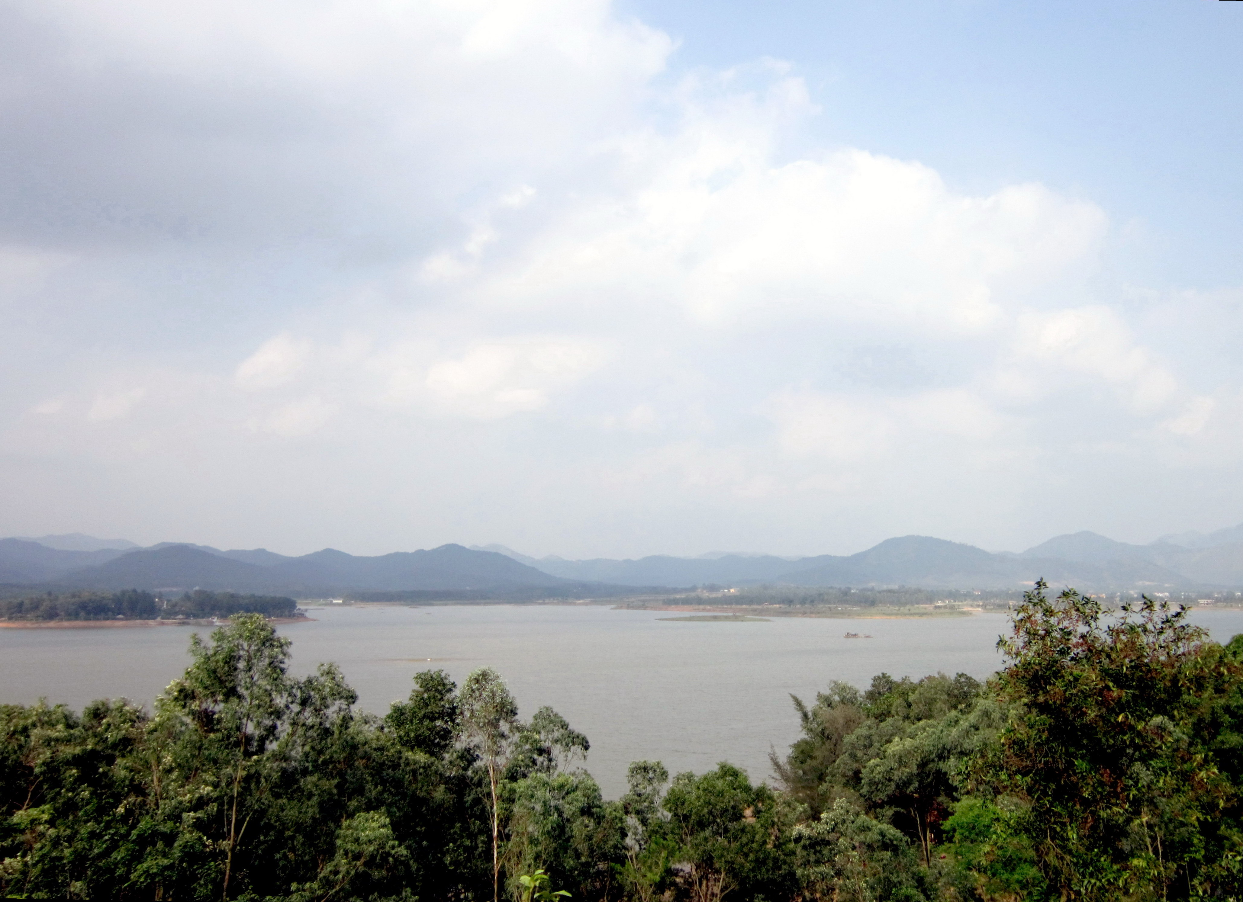 Hồ Đại Lải là một hồ nước nhân tạo thuộc huyện Mê Linh, Vĩnh Phúc, Việt Nam.